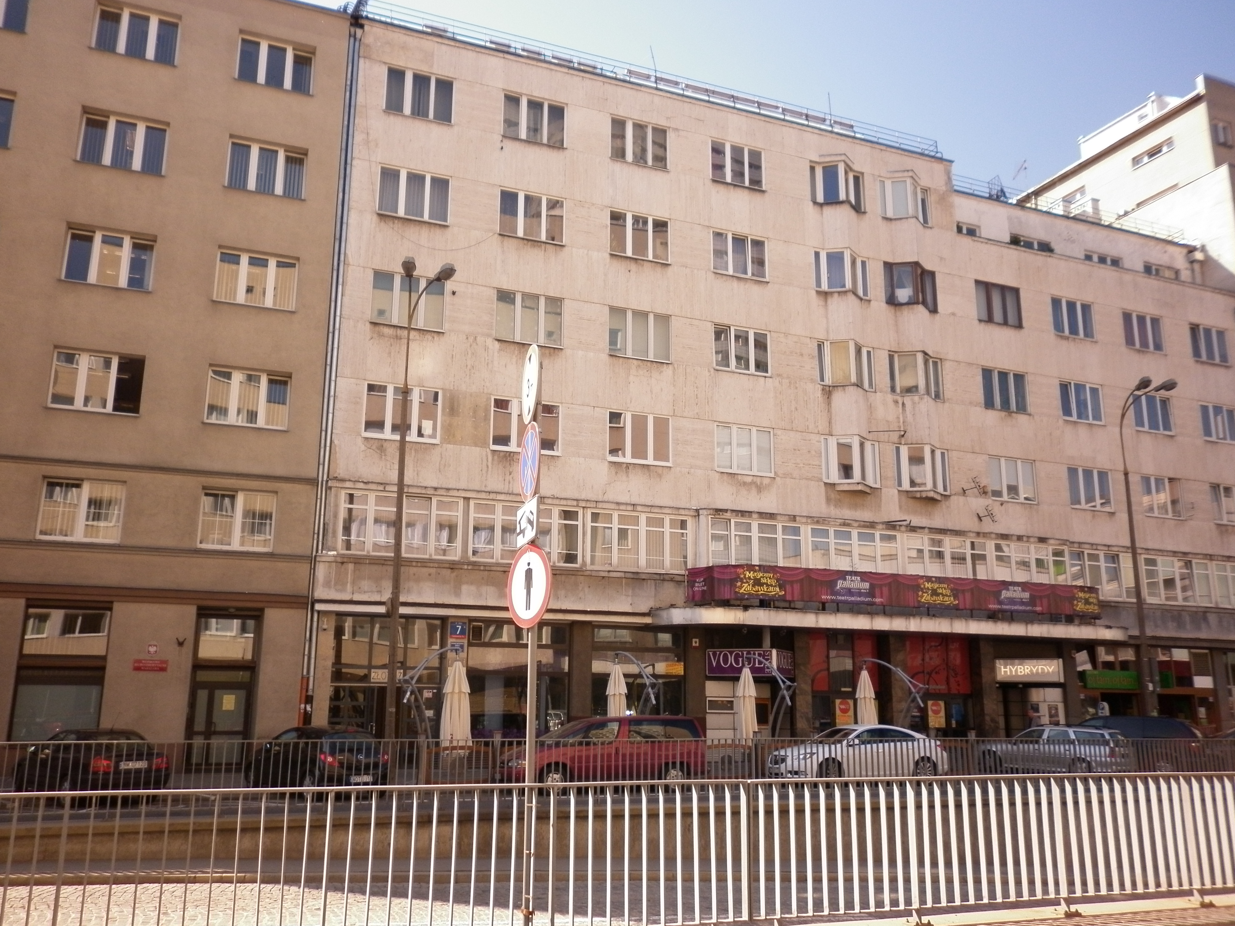 Siedziba SLD przy ulicy Złotej